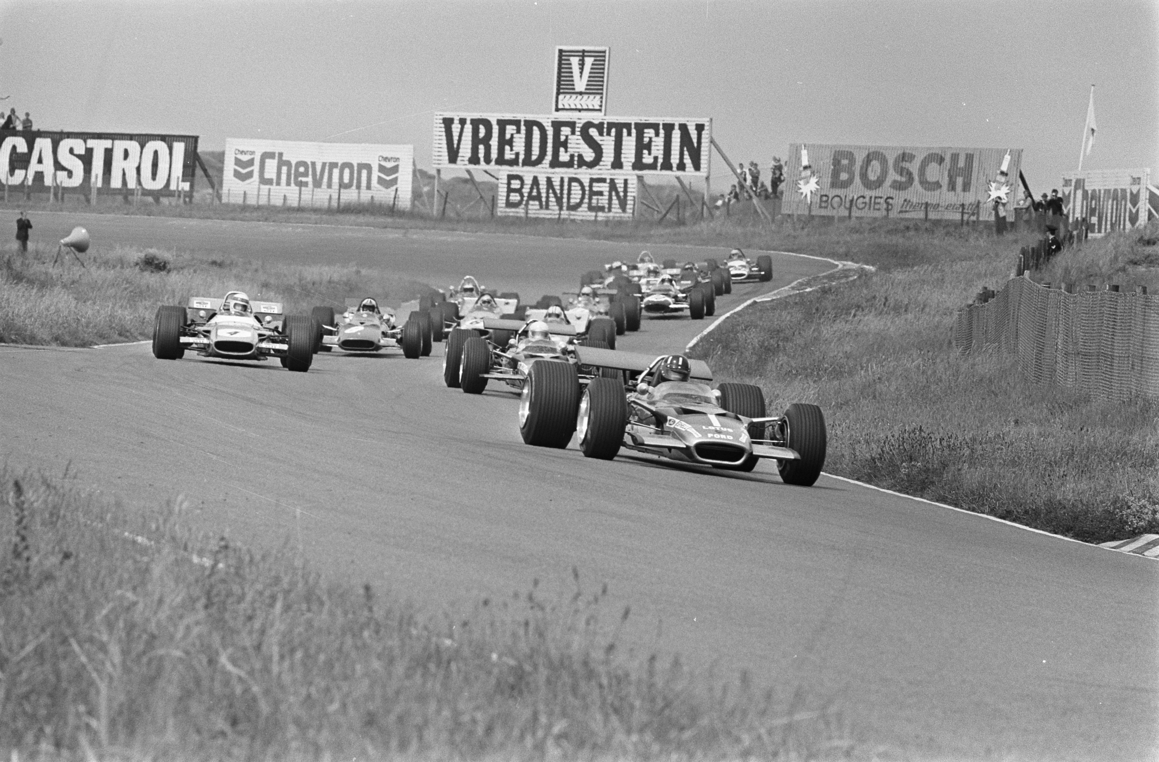 Alle rijders in de Tarzanbocht; rechts Graham Hill.